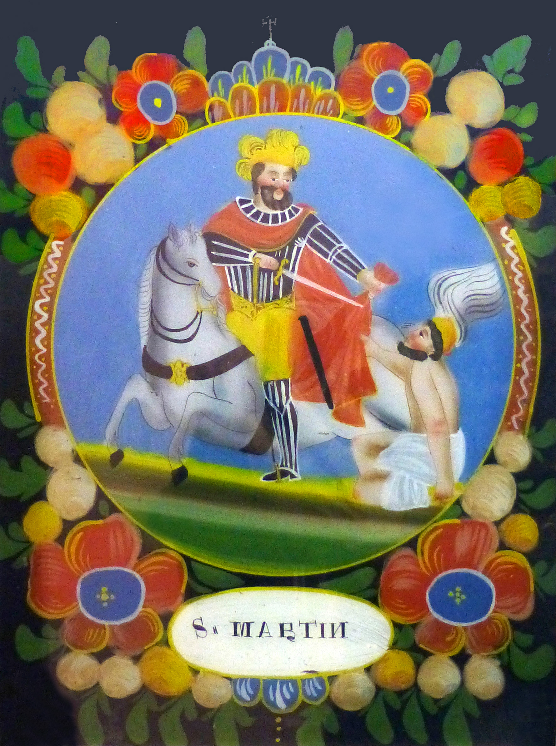 Peinture sous verre. Alsace. Saint Martin. Fin du XVIIIe siècle. Musée alsacien de Haguenau (Bas-Rhin). N° d'inventaire : 2009.0.13 PsV